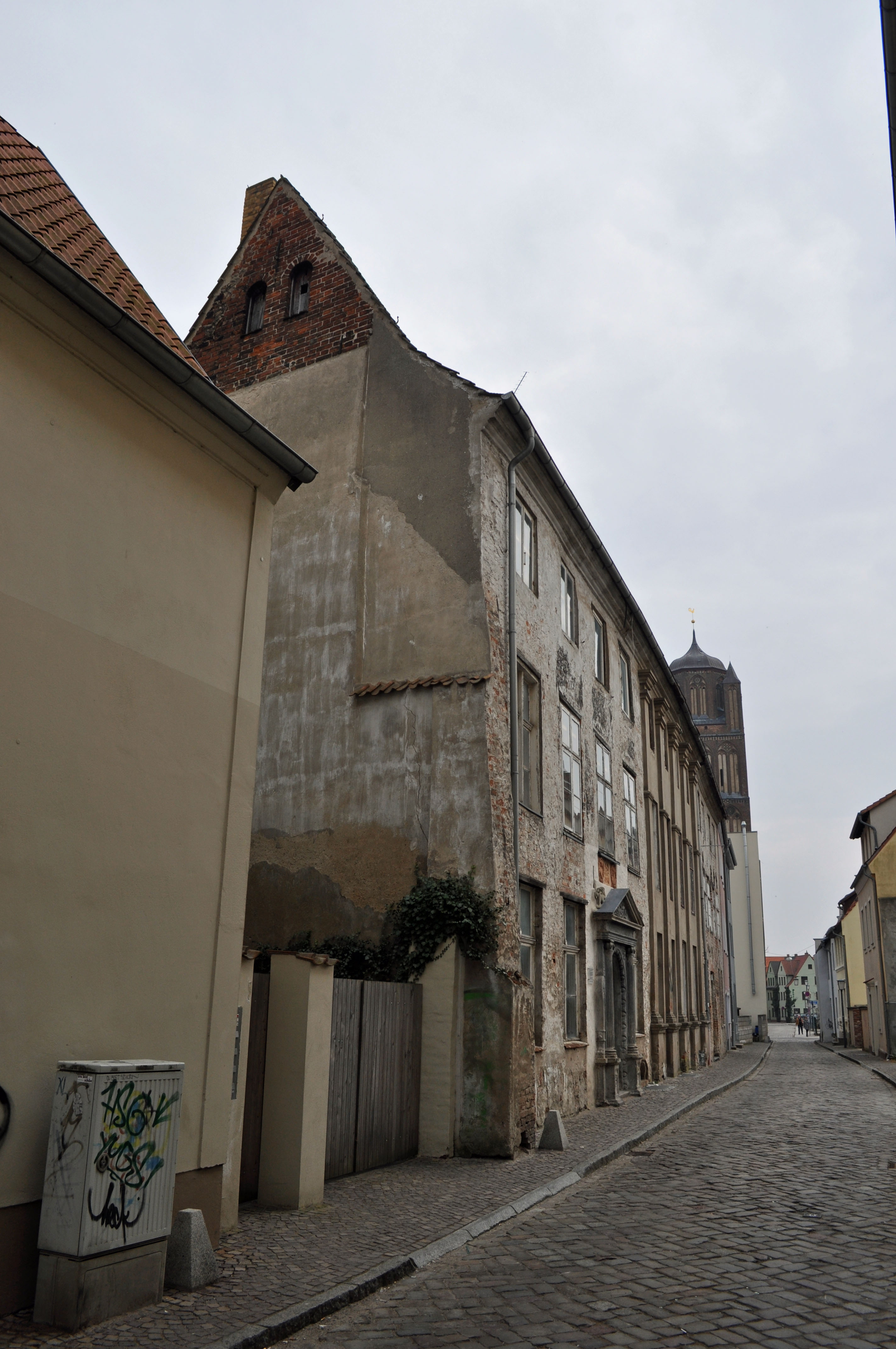 Gebäude bzw. Gebäudedetail in Stralsund. Straße und Hausnummer siehe Dateiname.